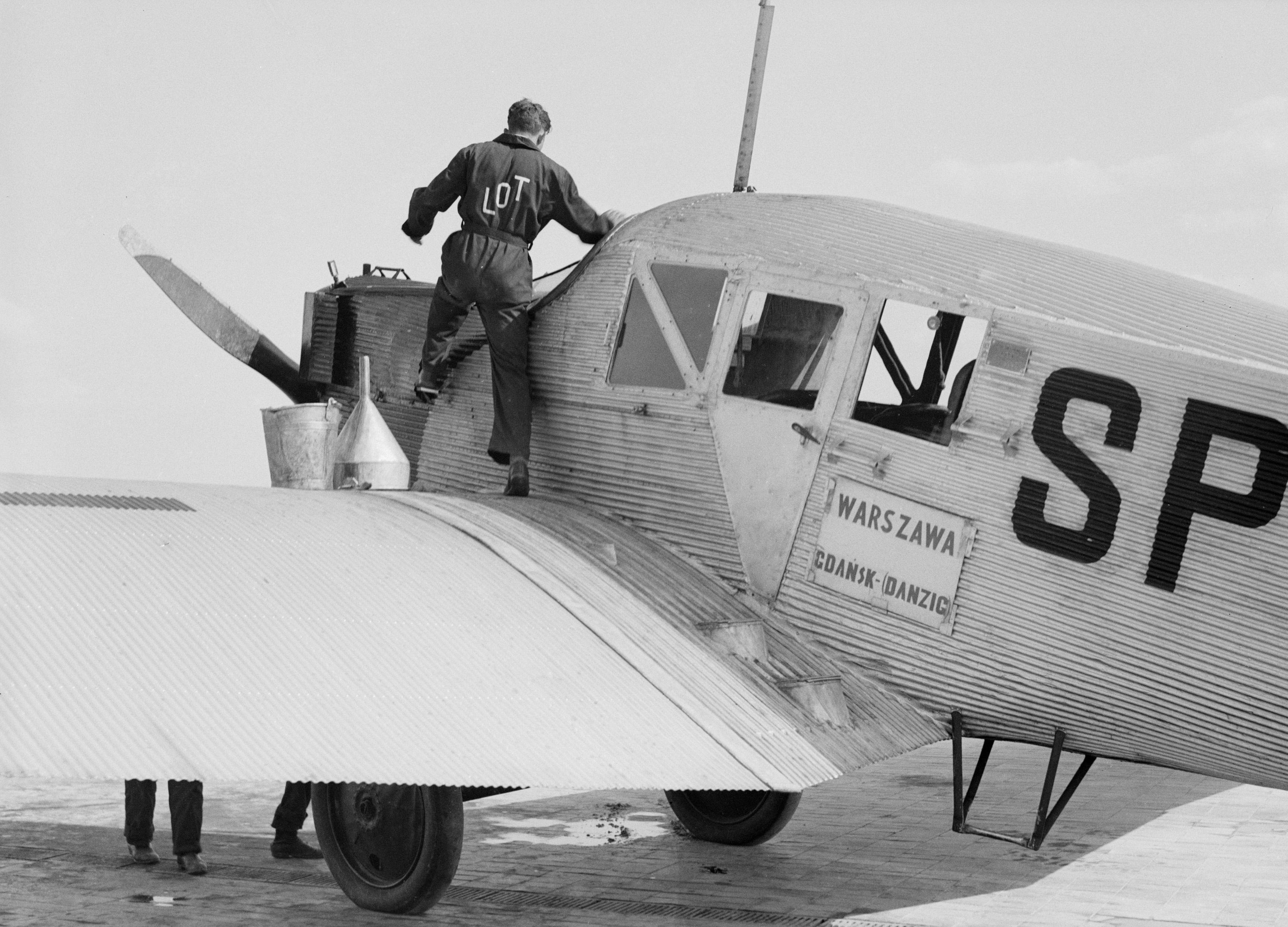 Collectie / Archief : Fotocollectie Van de Poll Reportage / Serie : Reis naar Polen Beschrijving : Vliegtuig op de luchthaven van Warschau in Polen Datum : 1934 Locatie : Polen, Warschau Trefwoorden : vliegtuigen, vliegvelden Fotograaf : Poll, Willem van de, [onbekend] Auteursrechthebbende : Nationaal Archief Materiaalsoort : Glasnegatief Nummer archiefinventaris : bekijk toegang 2.24.14.02 Bestanddeelnummer : 190-0017